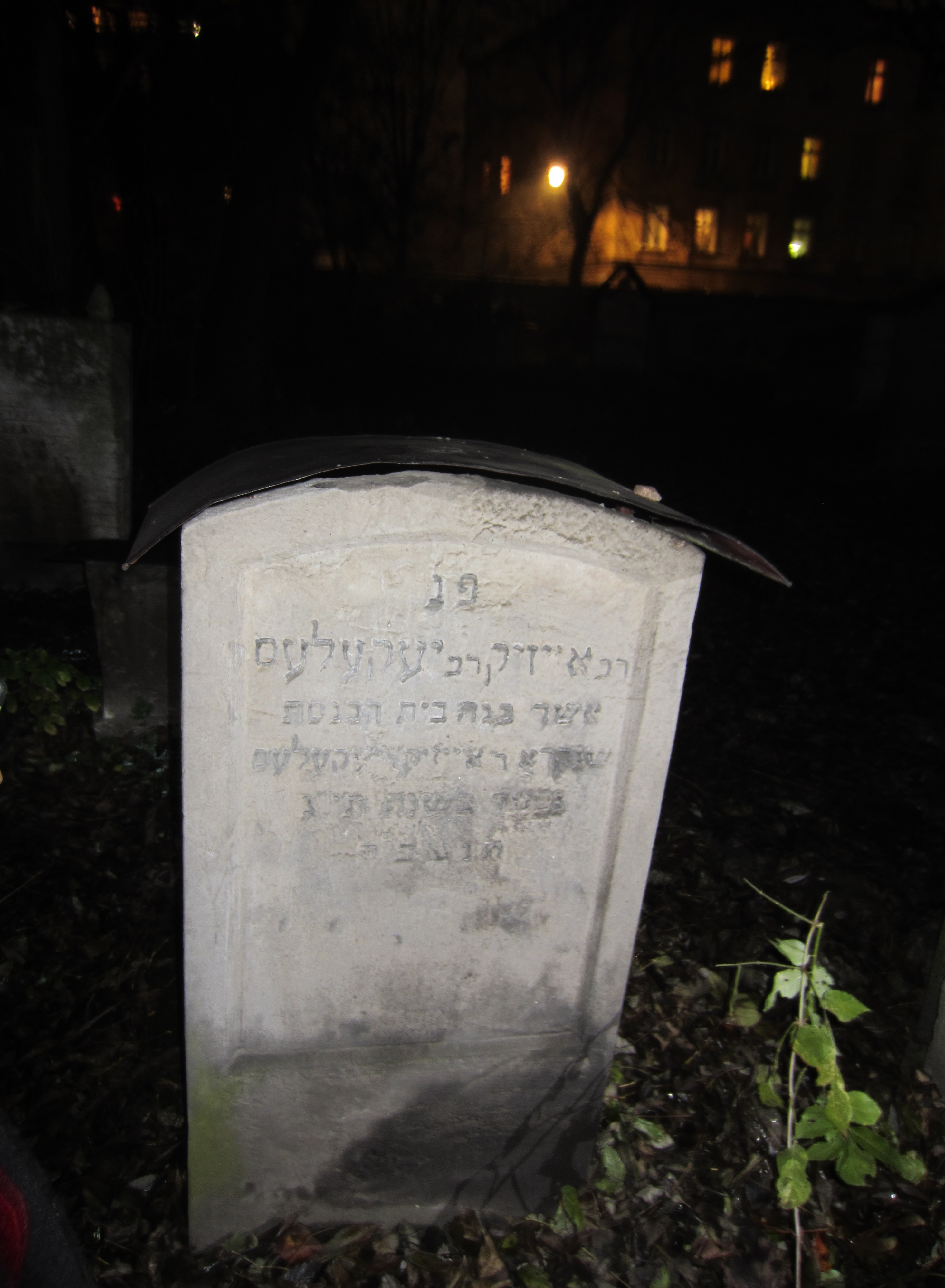 מצבת אייזיק יעקלס, בית הקברות היהודי העתיק בקרקוב.jpg